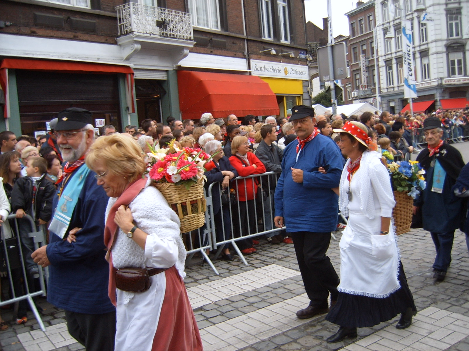 Costumes traditionnels liégeois : Houyeu (mineur) et botteresse (porteuse) personal picture.